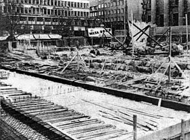 Skyddsrum byggs under Hötorget i Stockholm